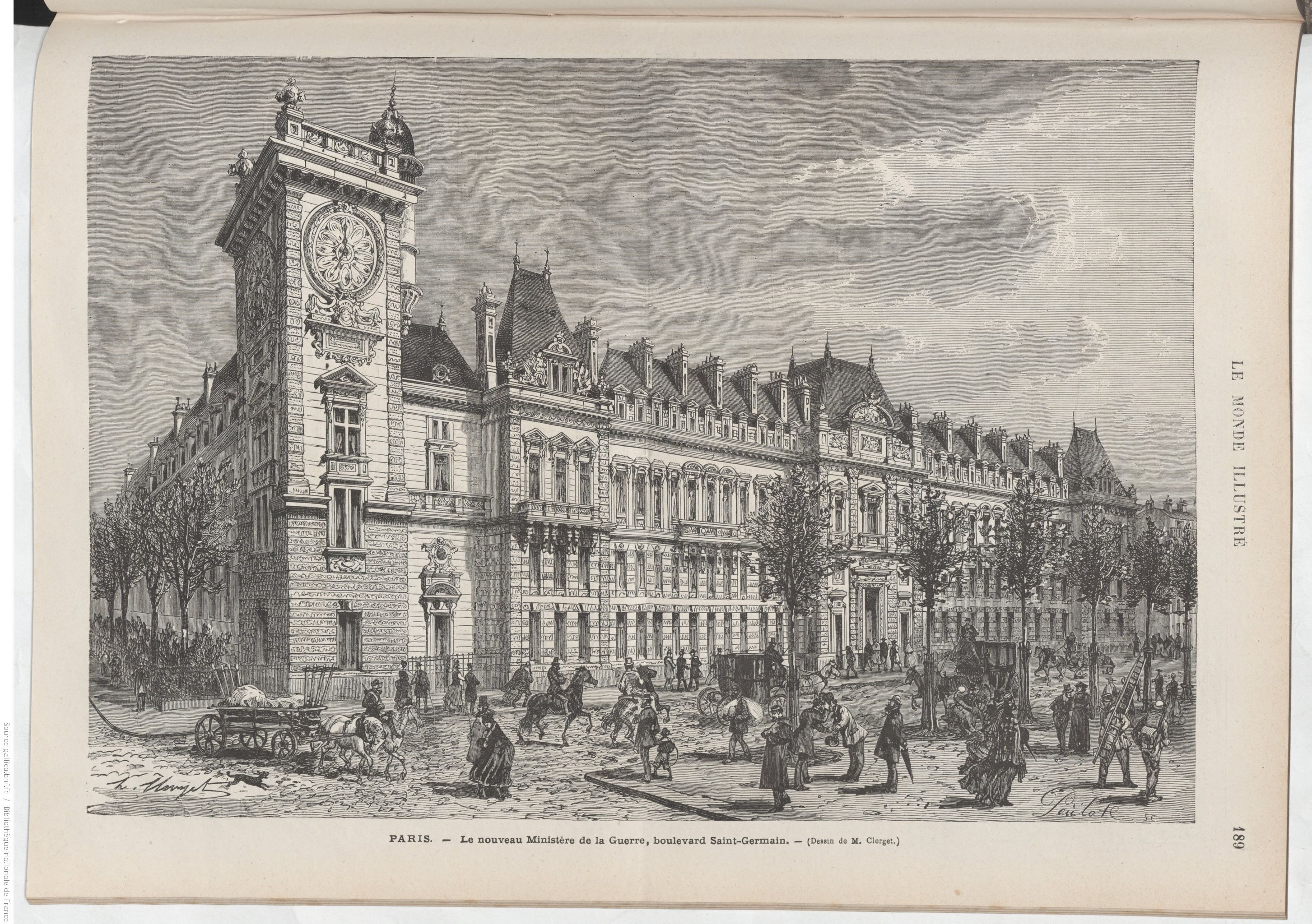 Le nouveau ministère de la Guerre, boulevard Saint Germain Extrait du Monde illustré du 24 mars 1977